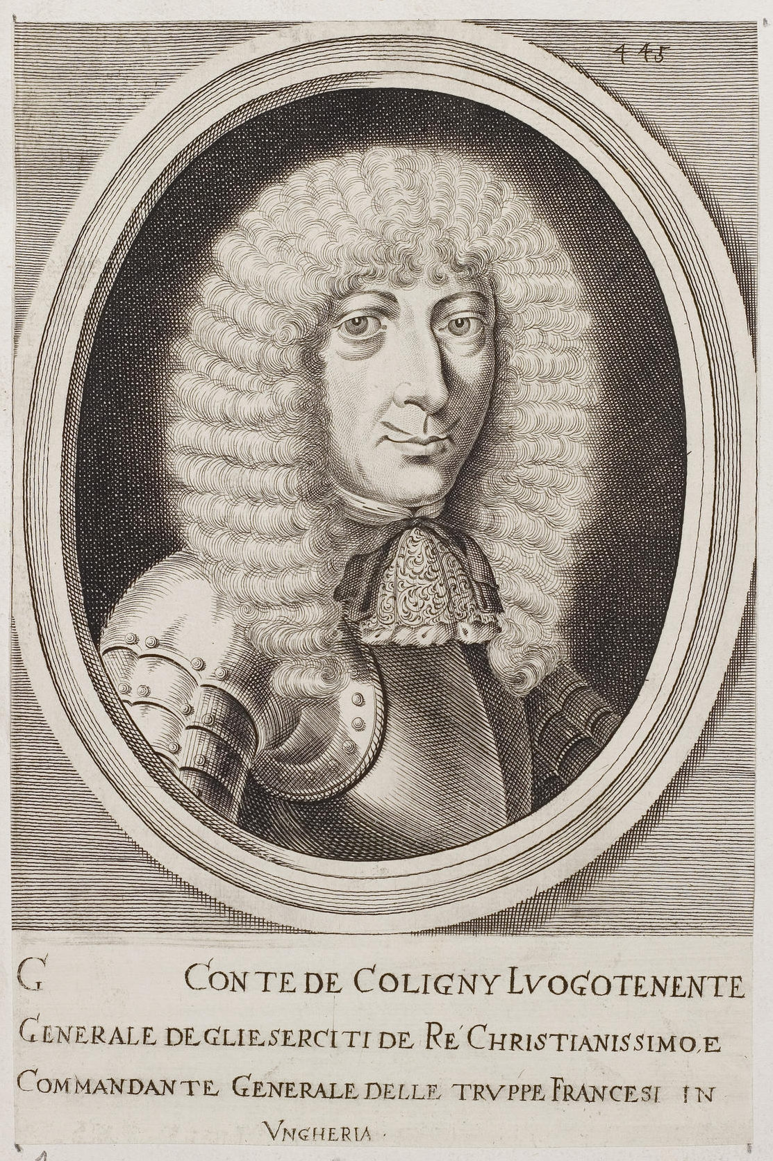 Grafik aus dem Klebeband Nr. 2 der Fürstlich Waldeckschen Hofbibliothek Arolsen Motiv: Jean de Coligny-Saligny (1617–1686), Page bei Ludwig XIII.; danach bei Kardinal Richelieu; danach Musketier; 1651 Ernennung zum Gouverneur von Autun; danach in Diensten des Prinzen Condé; seit 1664 in kaiserlichen Diensten u. Ernennung zum Leutnant-General